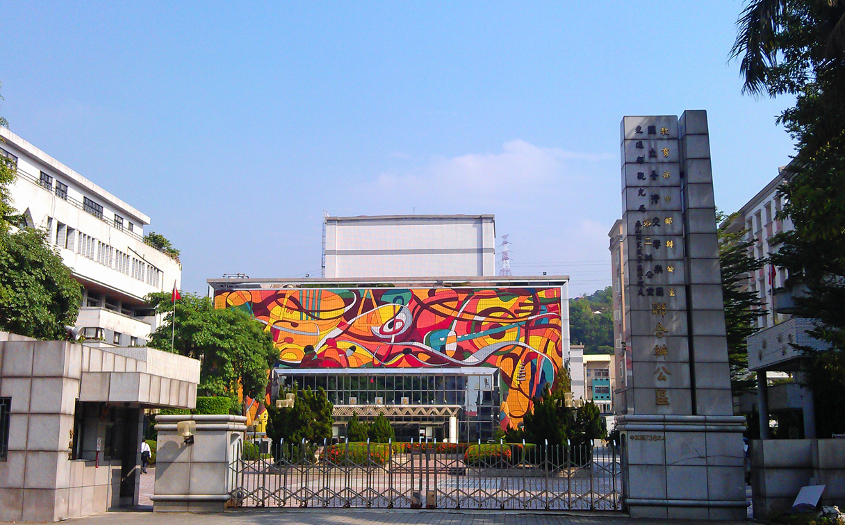 中文（台灣）: 教育部中部辦公室、國立臺灣交響樂團、交通部觀光局第二辦公室、交通部觀光局參山國家風景區管理處聯合辦公區，地址：臺中市霧峰區中正路738之4號。